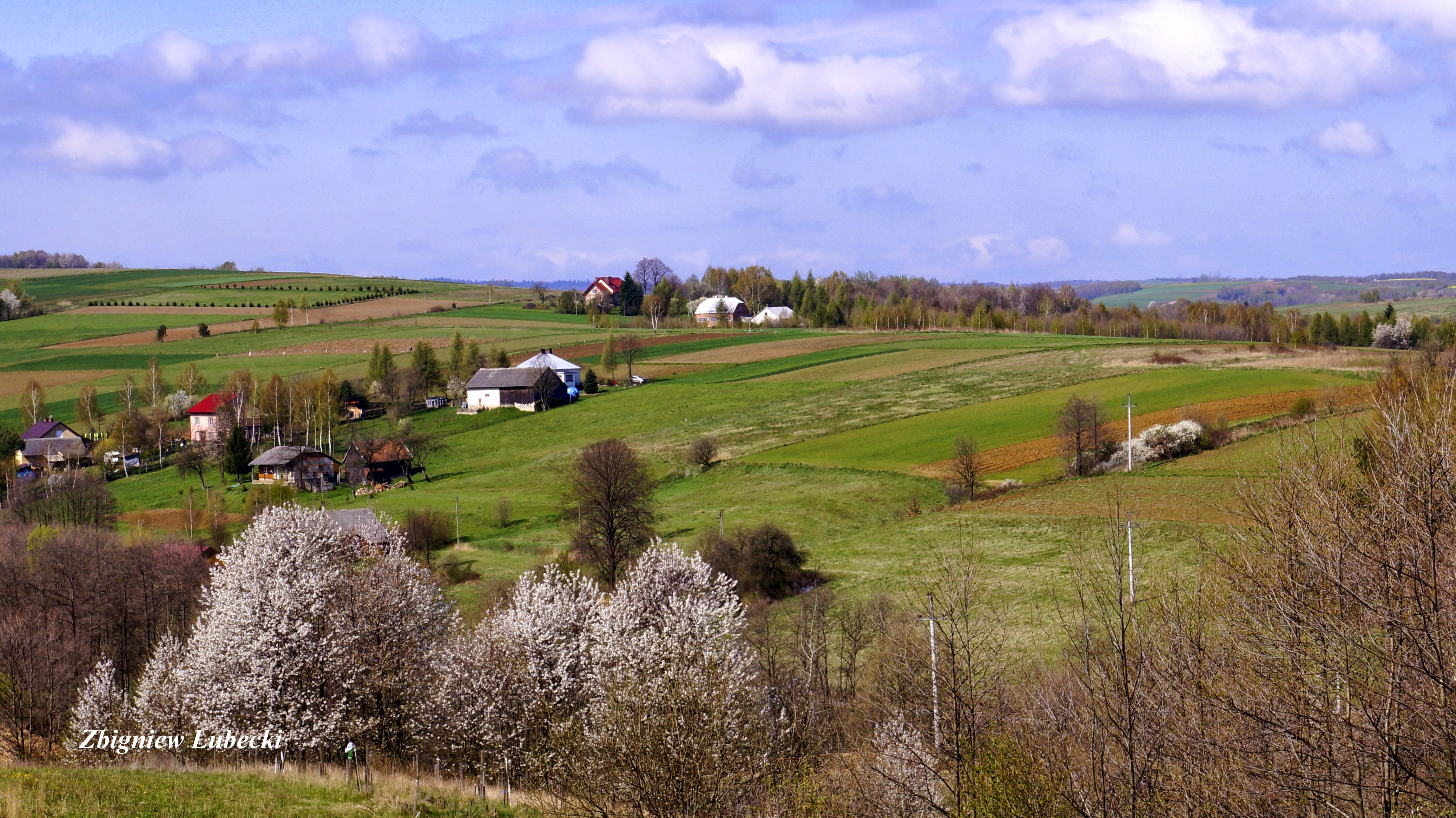 Futoma - Matulnik